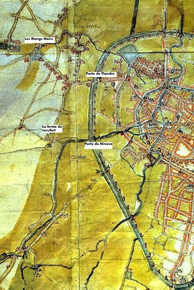 Carte de Molenbeek et de la partie ouest de la 2e enceinte de Bruxelles. On y remarque les rivières suivantes:La Senne, qui traverse toute la moitié droite de l'image du sud au nord ;La Sennette, ou Senne de Ransfort, qui passe prés de la ferme de Ransfort, entre en ville par l'actuelle porte de Ninove, et se divise en deux autour de la Grande-Île avant de se jeter dans la Senne ;Le Molenbeek, qui passe aux Étangs Noirs dans le haut à gauche, serpente d'ouest en est vers une espèce d'étang situé à l'intérieur des murs de la ville, et repart ensuite vers le nord.